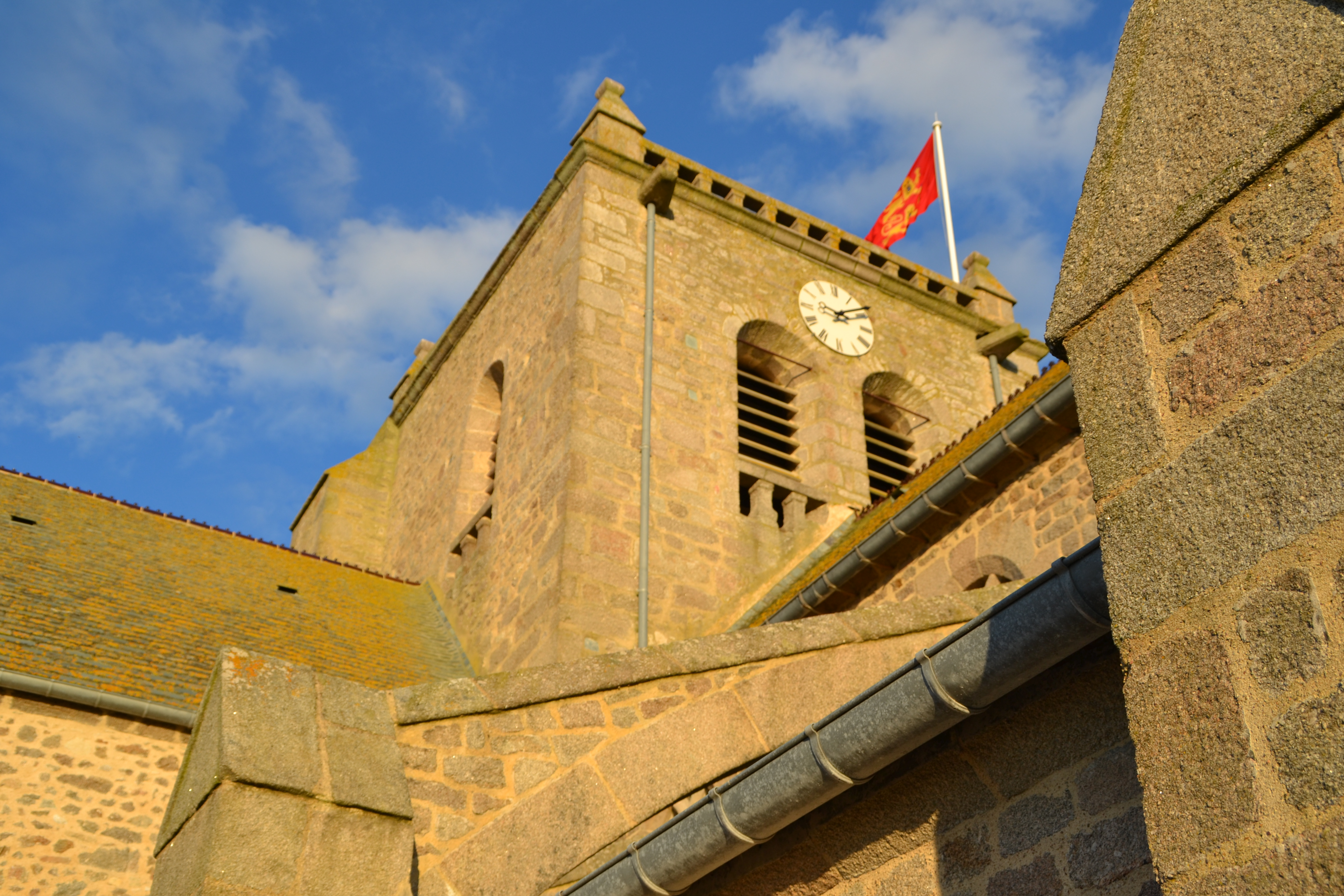 Le clocher depuis sa restauration